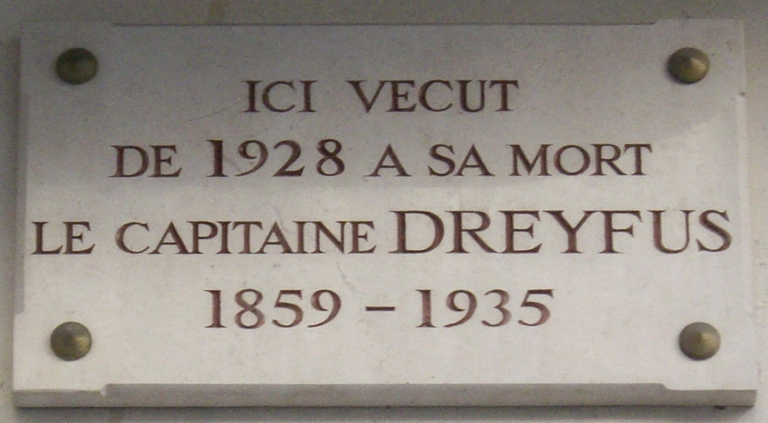 Plaque commémorative, 7 rue des Renaudes, Paris 17e. « Ici vécut de 1928 à sa mort le capitaine Dreyfus, 1859-1935. »